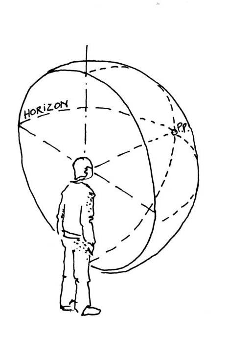 schéma projection perspective sphérique